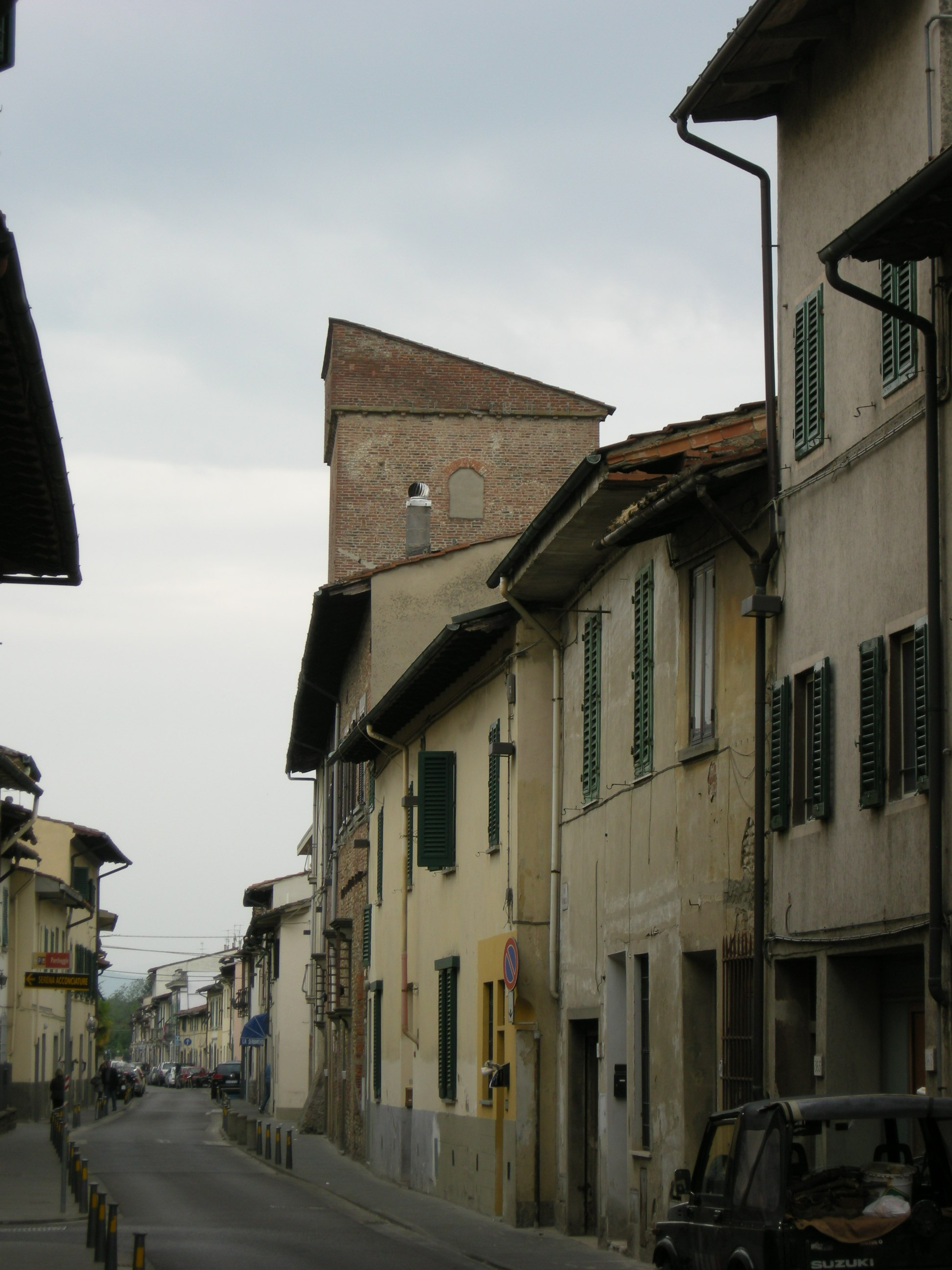 Torrione di brozzi